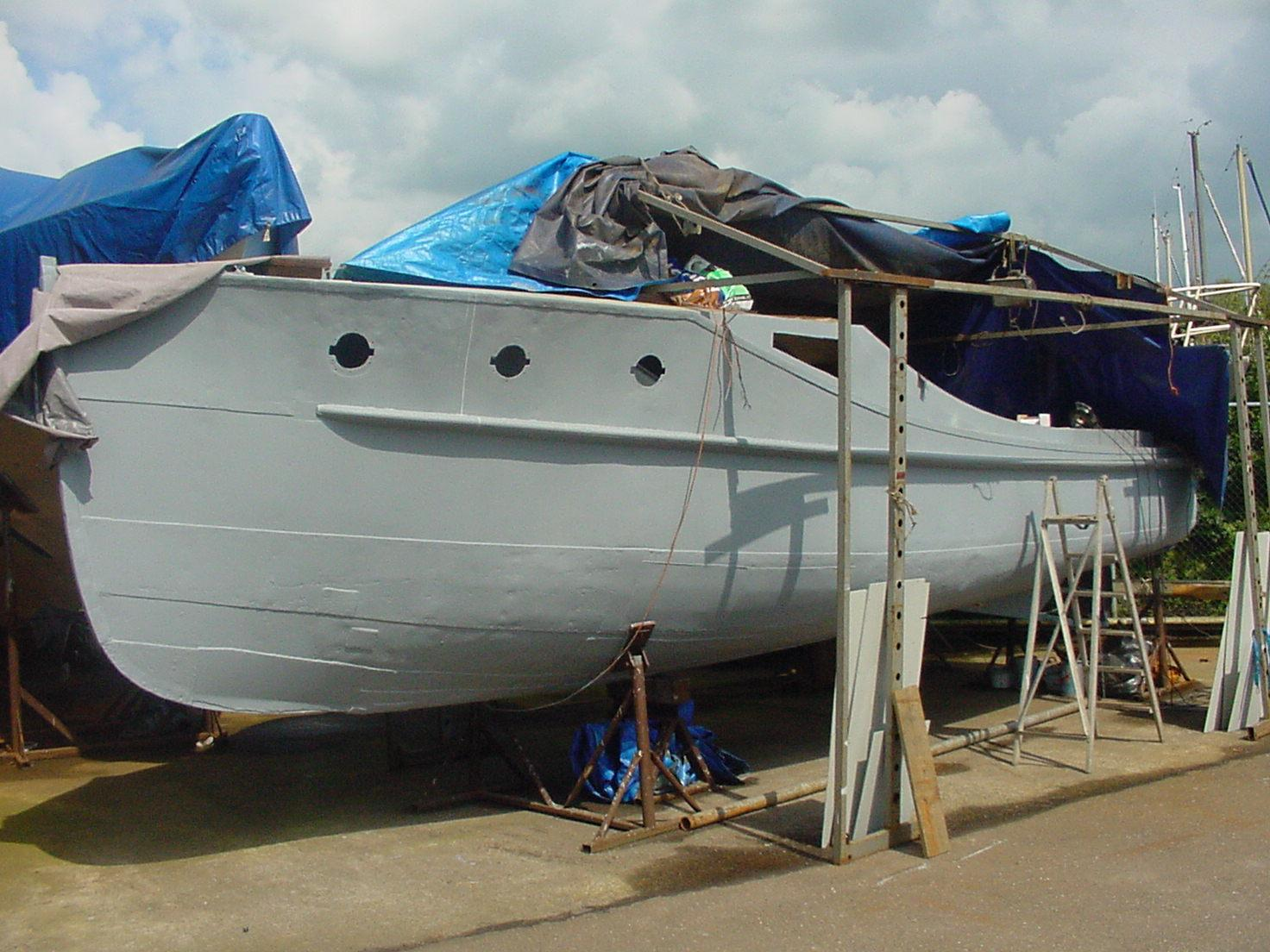 Deze foto heb ikzelf van mijn eigen schip gemaakt. Het is een bakdekker genaamd Pelikaan. zie ook [1]